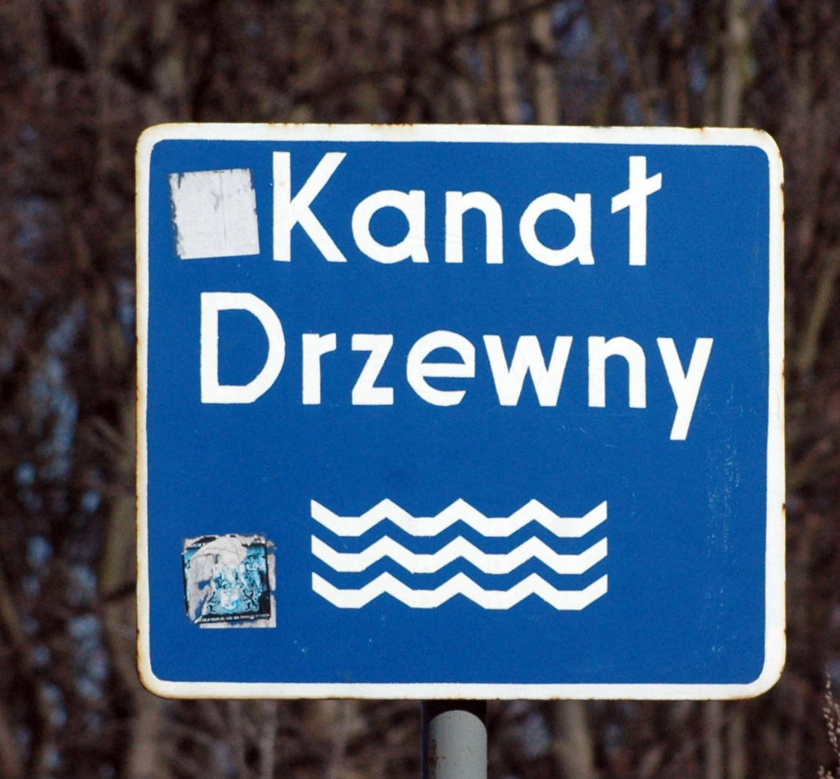 Tablica z nazwą Kanału Drzewnego w Kołobrzegu